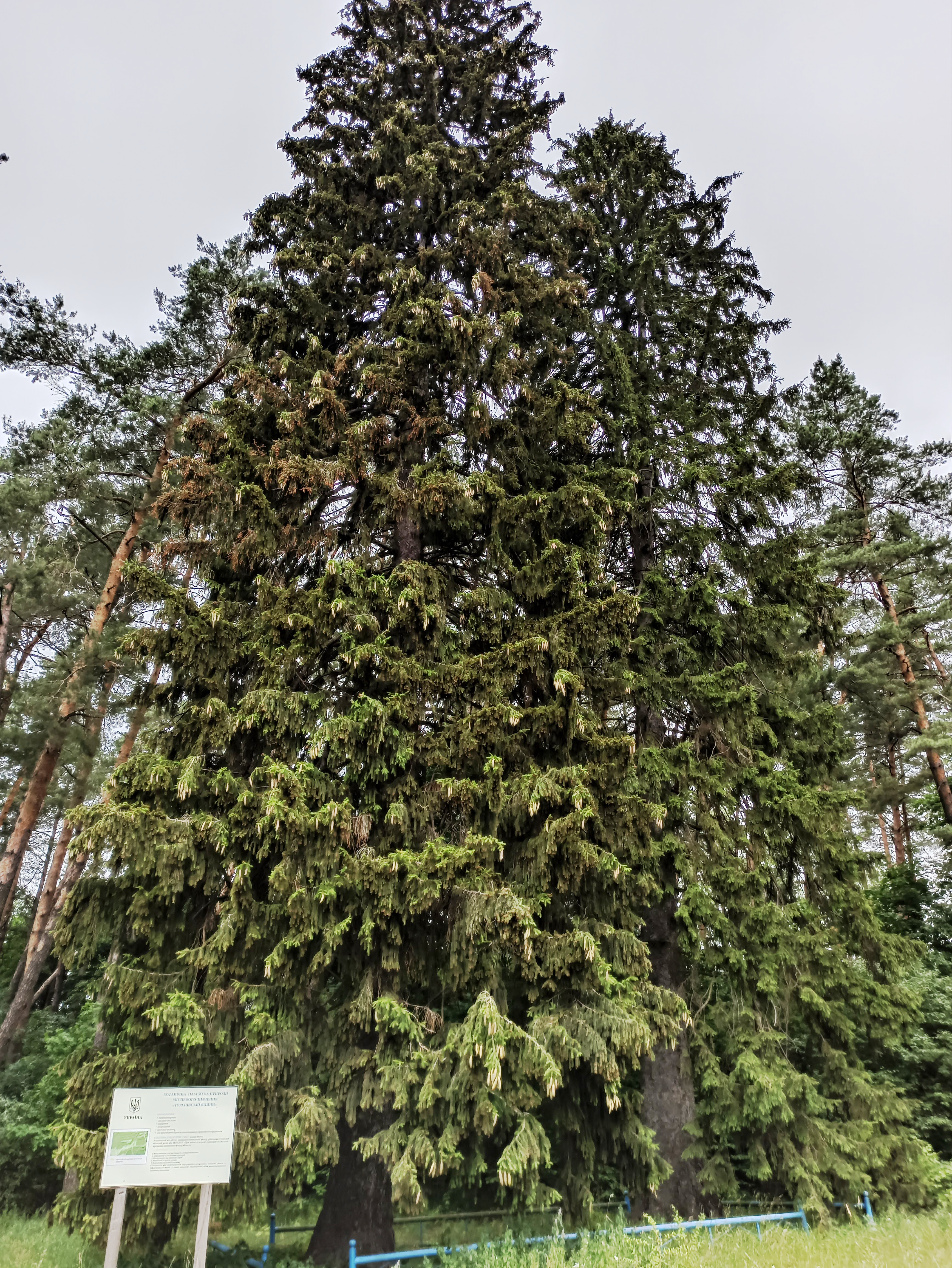 «Туранівські ялини», Ямпільський р-н; поряд з автодорогою «Глухів-Ямпіль», біля повороту до с. Туранівка Воздвиженської сільської ради